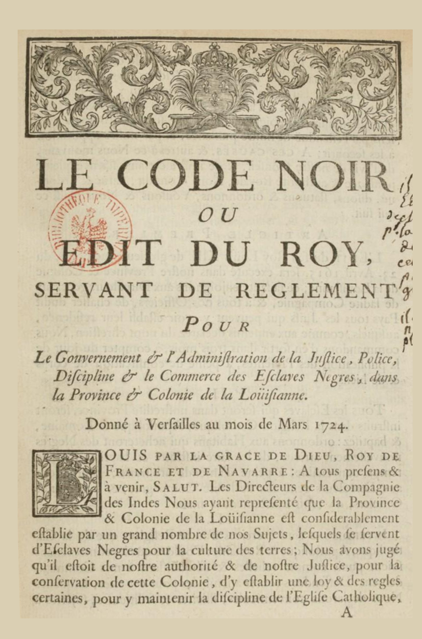 Page de titre de : Louis XV, roi de France, 1710-1774.- Code noir, ou Édit du Roi, servant de règlement pour le gouvernement et l'administration de la justice, police, discipline et le commerce des esclaves nègres dans la province et colonie de la Loüisianne (1727), Imprimerie royale, Paris, 1727. Avec des annotations manuscrites. Cf. File:Le Code noir, ou Édit du Roi, Esclaves nègres, Louisianne,1727.djvu